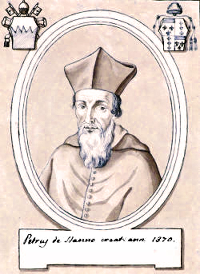 Cardinal Pierre d'Estaing